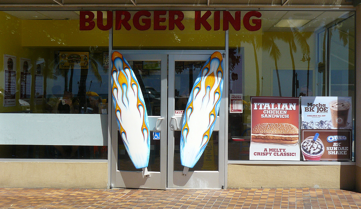 BURGER KING Filiale auf O'ahu/ Hawaii